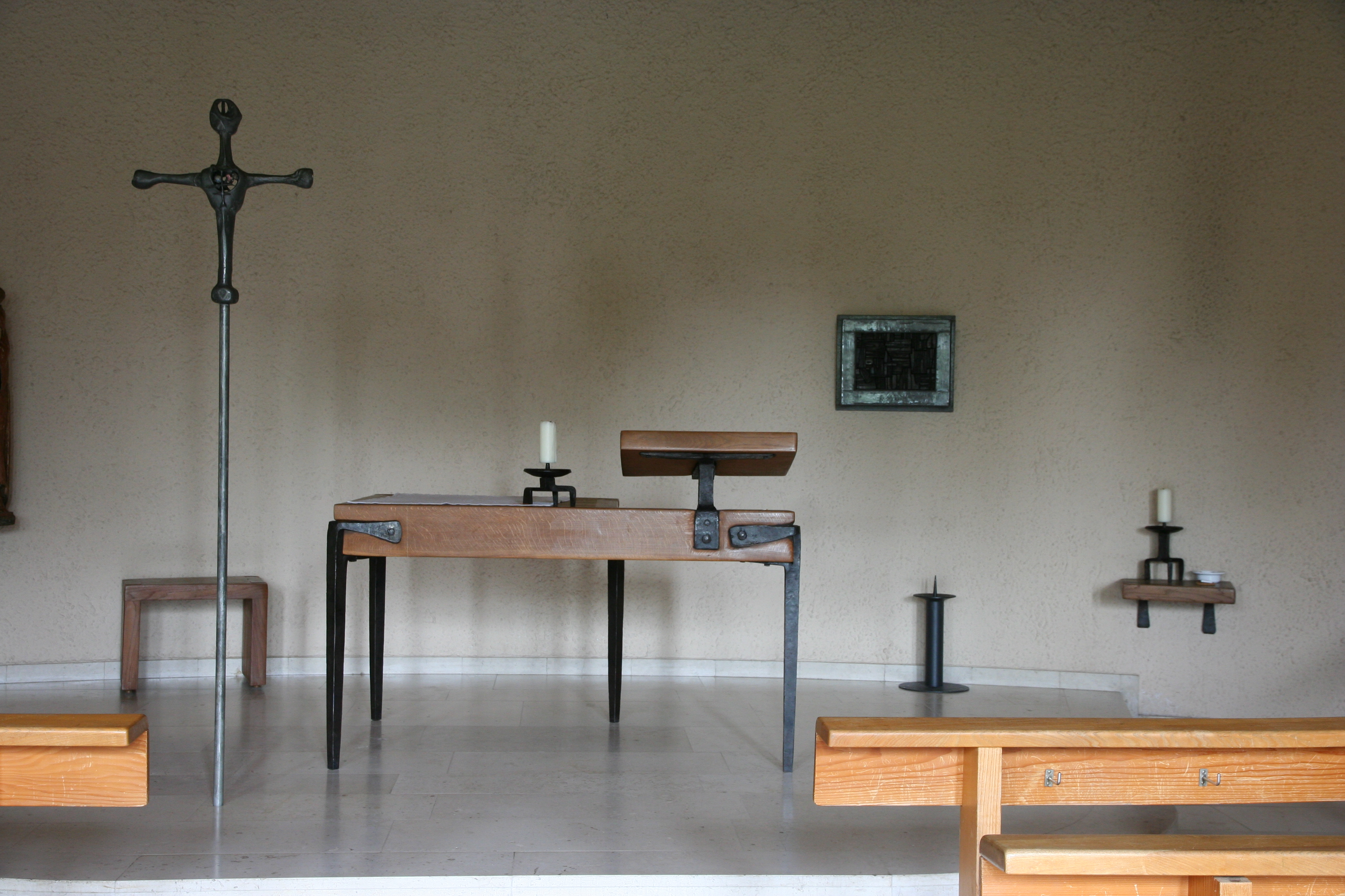 Römisch-katholische Kirche Bruder Klaus Basel, Krypta, Altarraum von Hans Christen